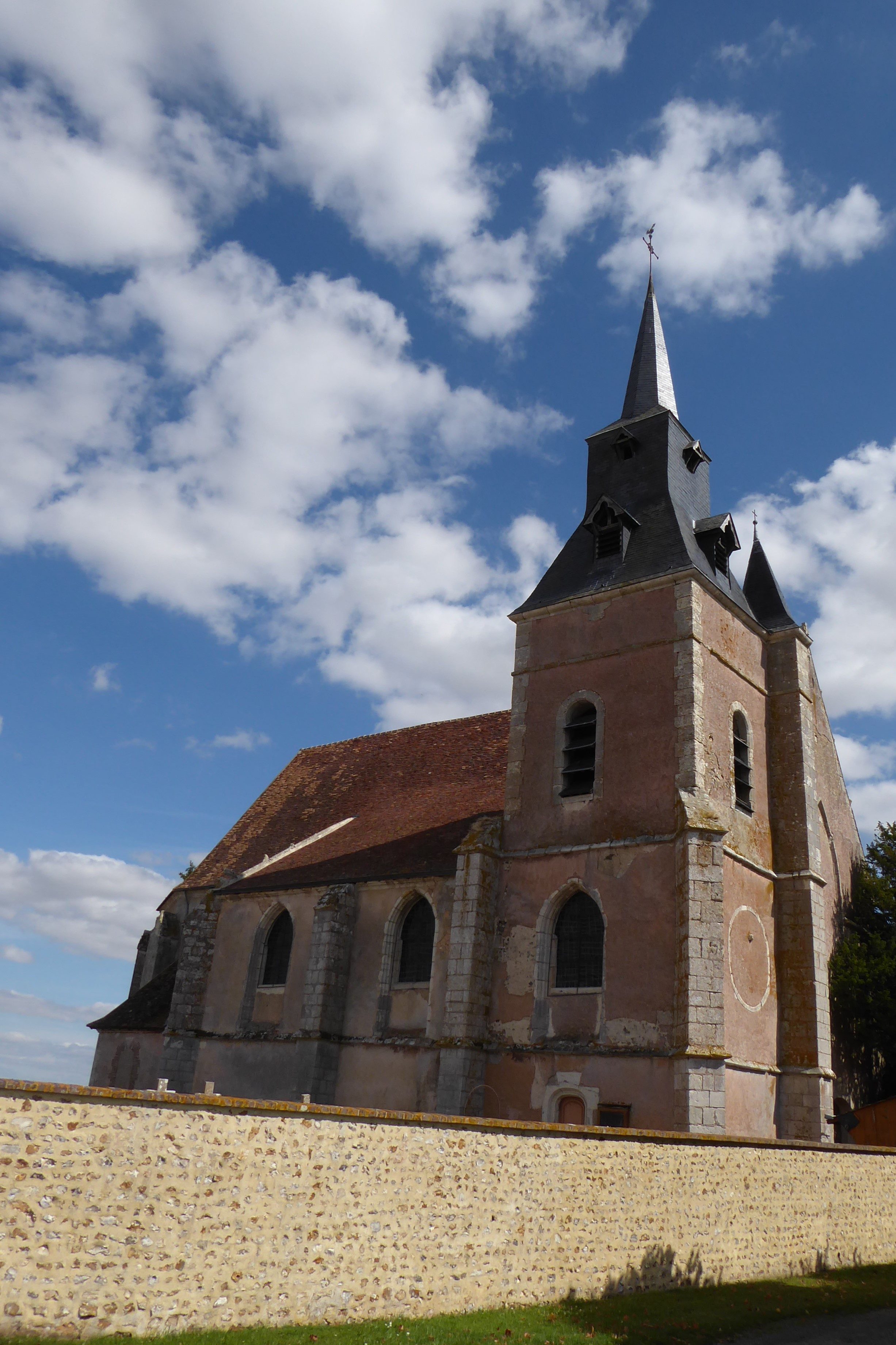 église Saint-Martin et cimetière, Orrouer, Eure-et-Loir, France.